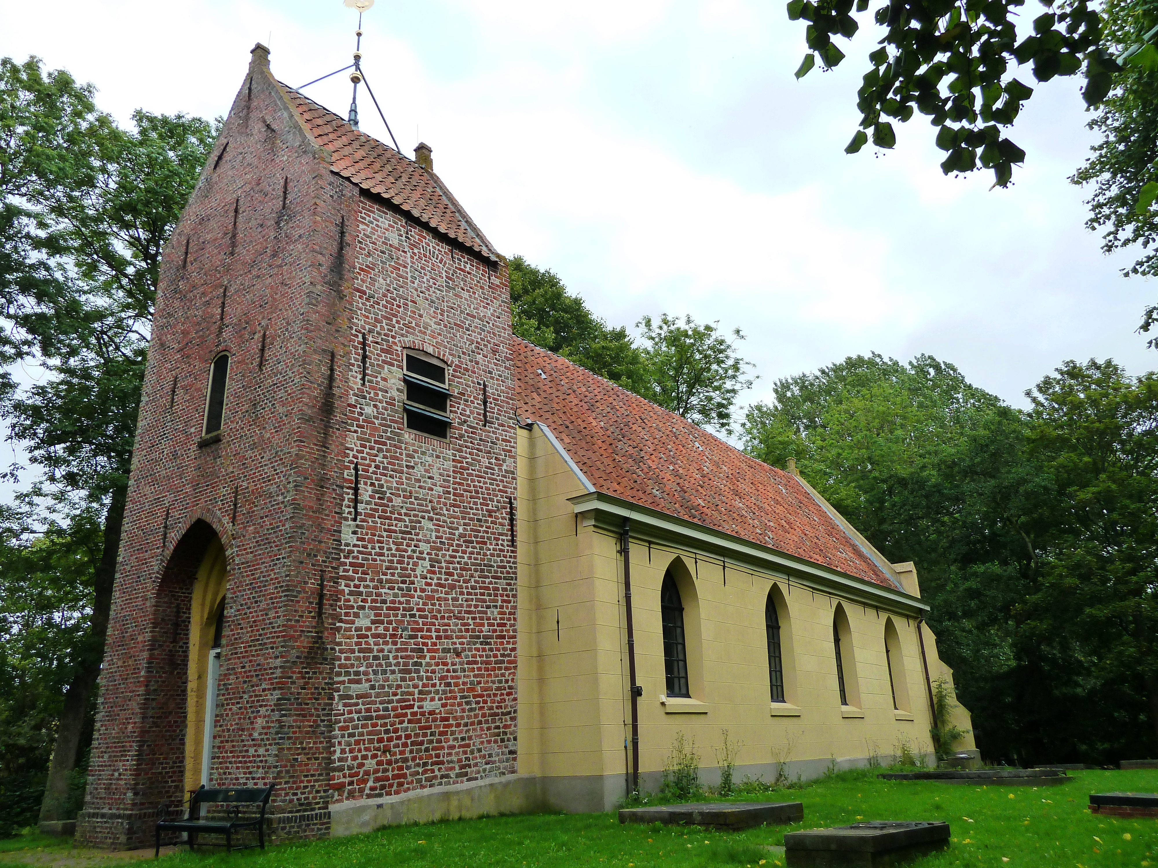 Achterzijde van de hervormde Kerk van Westernieland (tot 1717 de voorzijde).